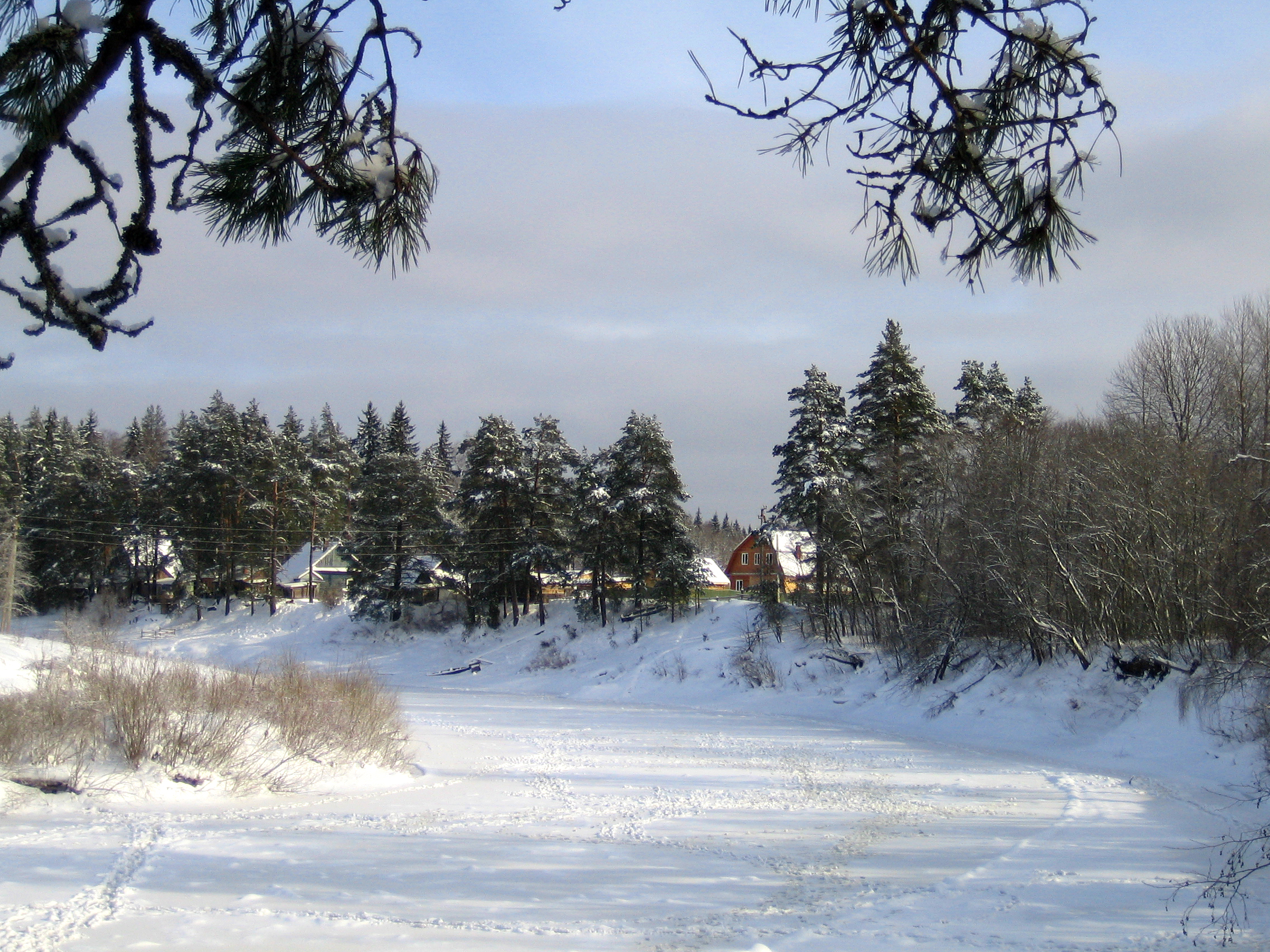 Деревня Фёдоровское, Смоленская область, Угранский район